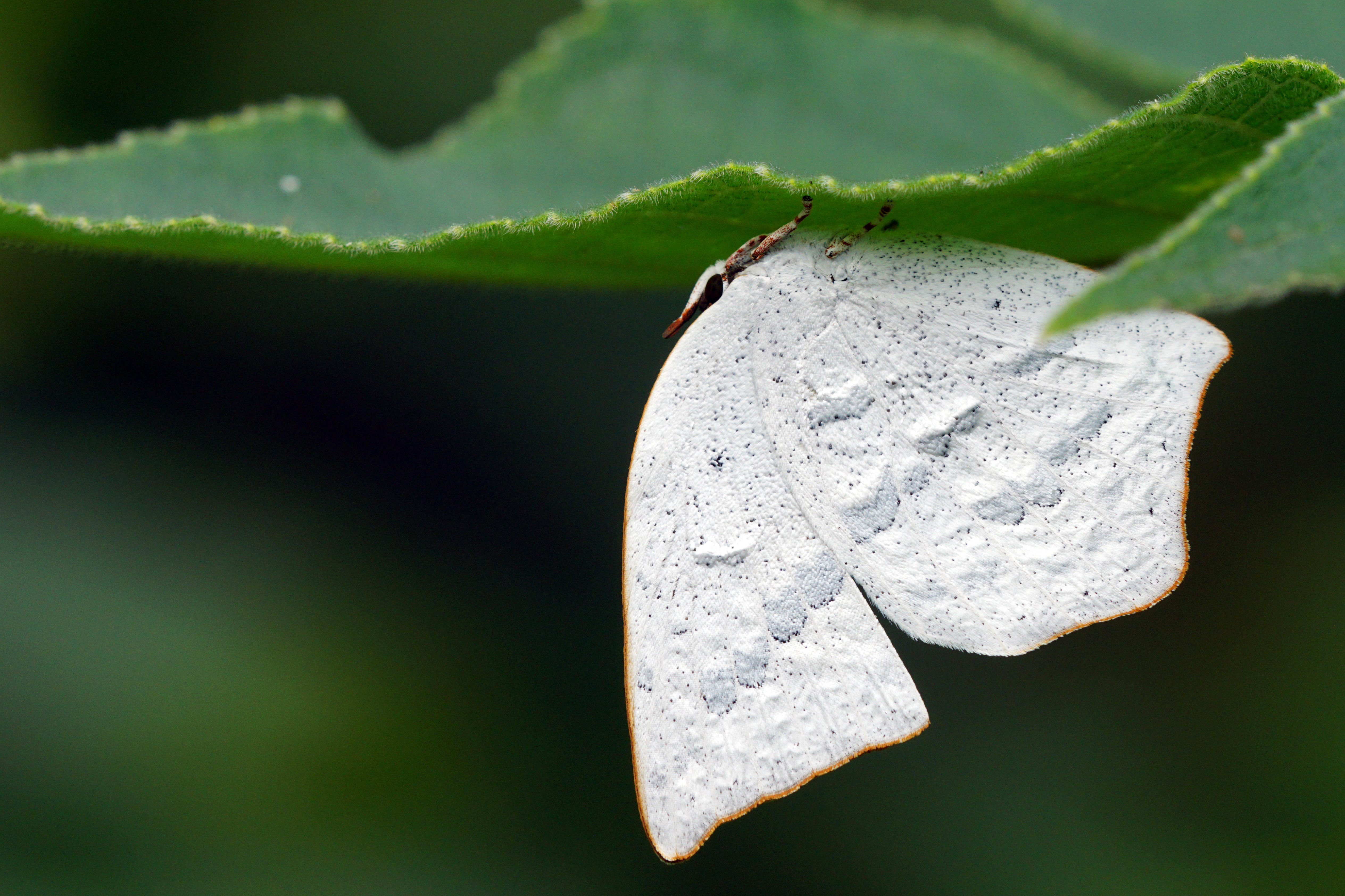 銀灰蝶 Curetis acuta formosana